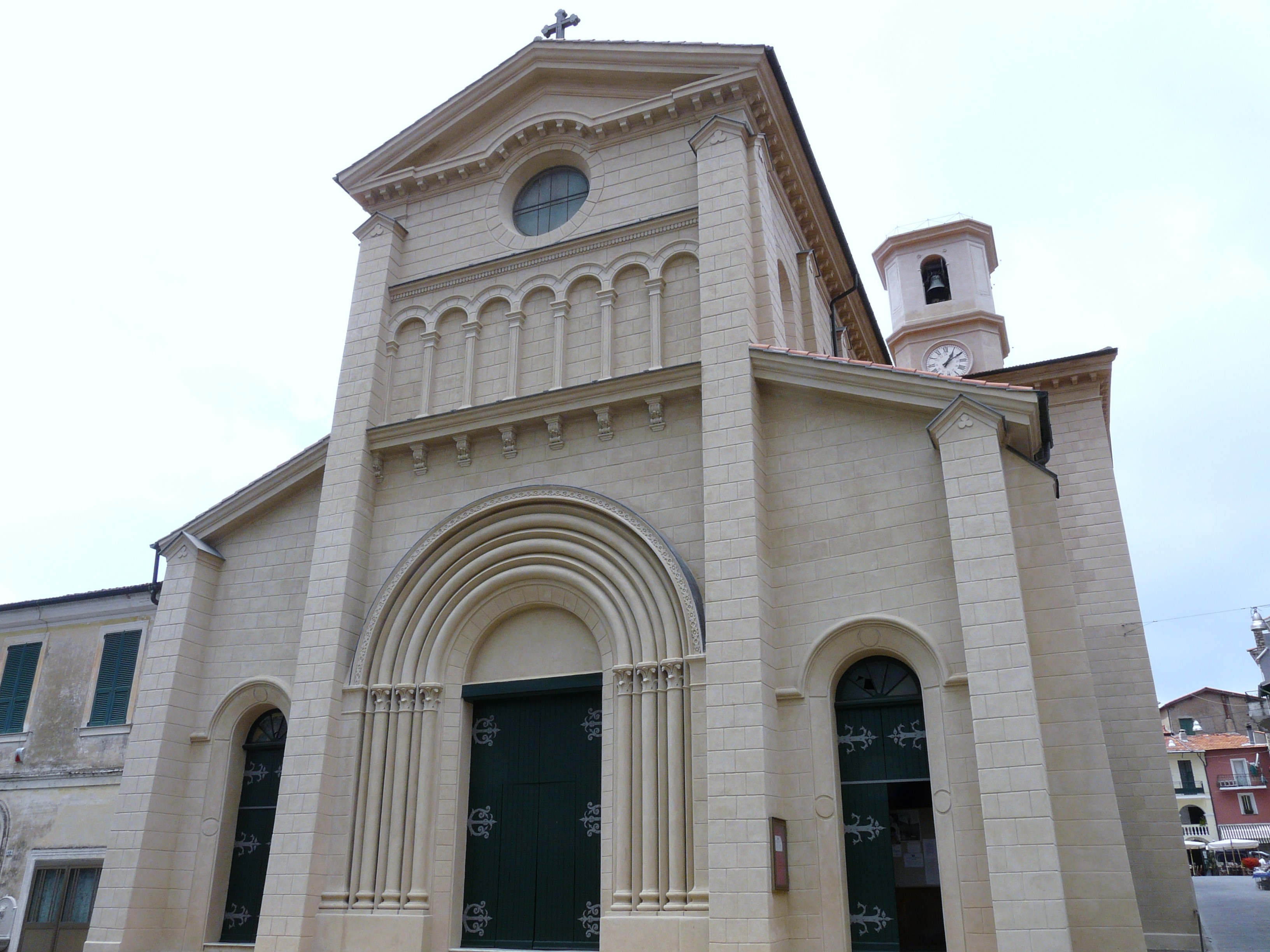 Chiesa nuova di San Nicolò, Bajardo, Liguria, Italia